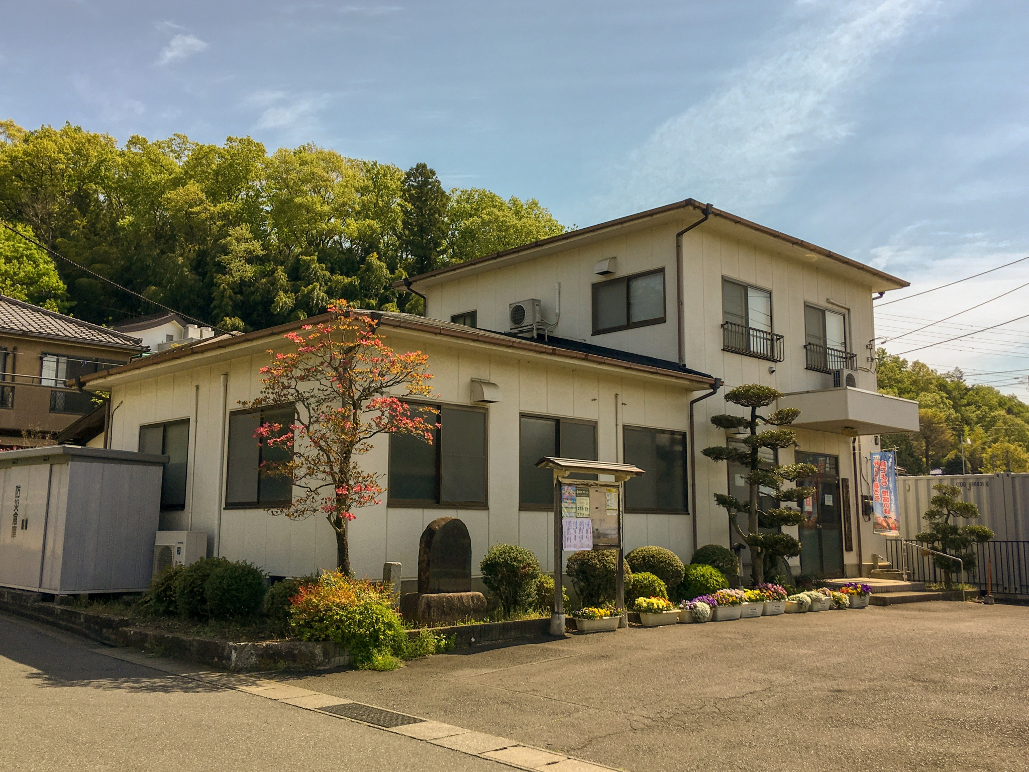 宮下町公会堂